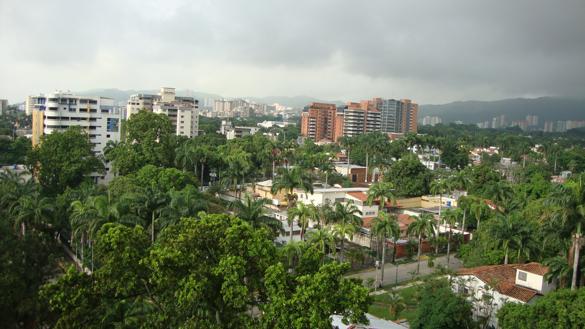 ciudad de valencia sector los mangos nucleo verde